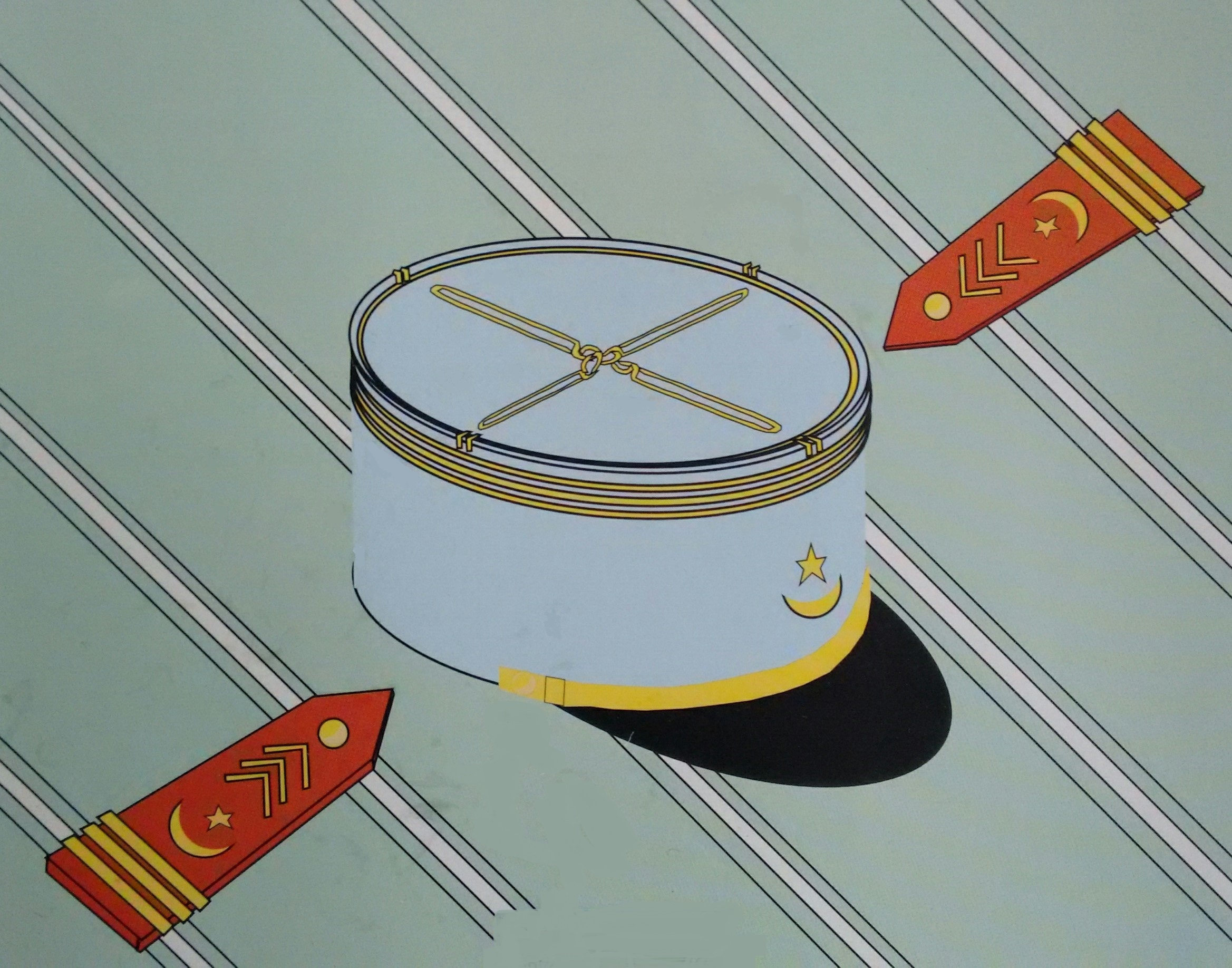 Uniforme civil des "Képi-bleu"